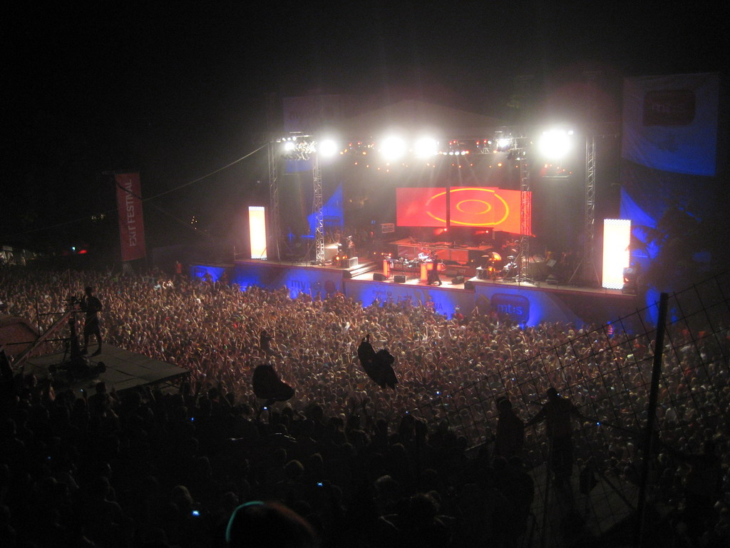 Nastup Booka Shade-a na EXIT-u 2008